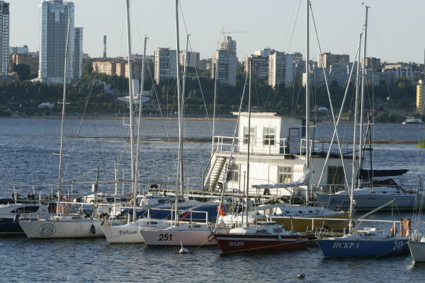 Яхт-клубы России